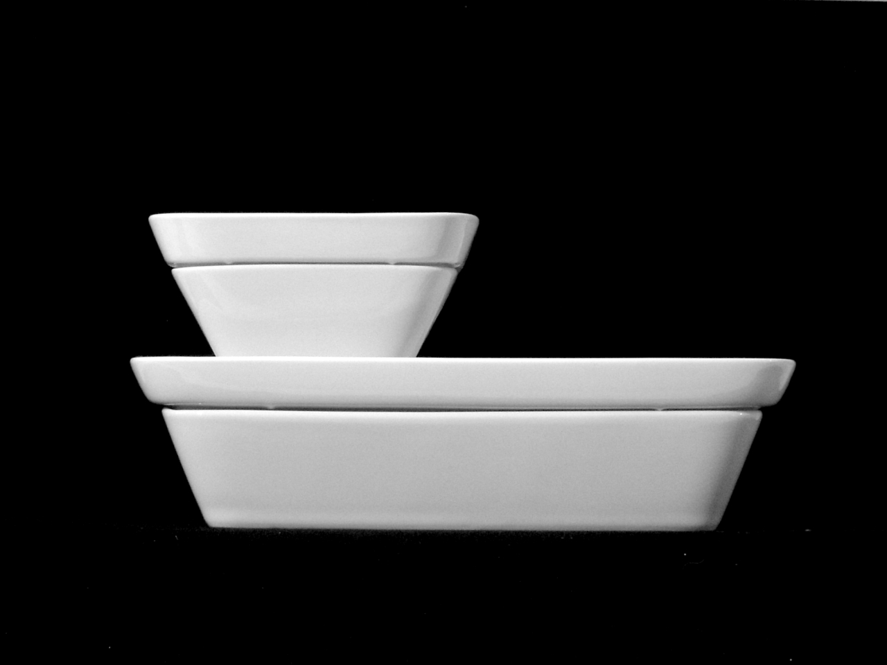 Schalensatz Arzberg 1100: 2 Schalen unterschiedlicher Größe jeweils mit Deckel.